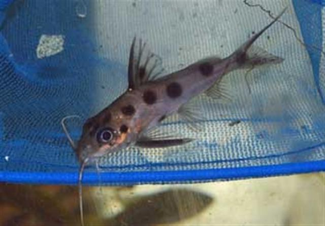 Synodontis notatusSynodontis notatus